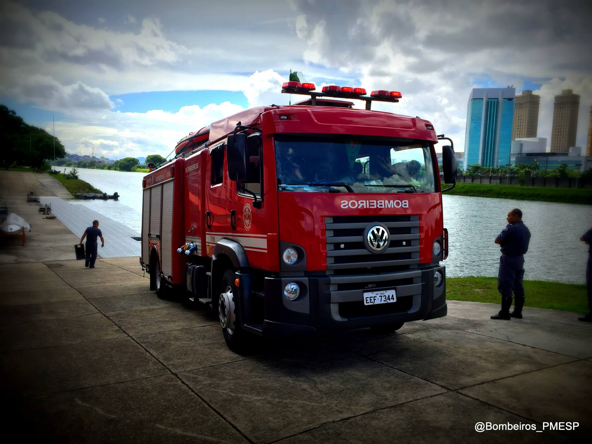 Auto Bomba 04109